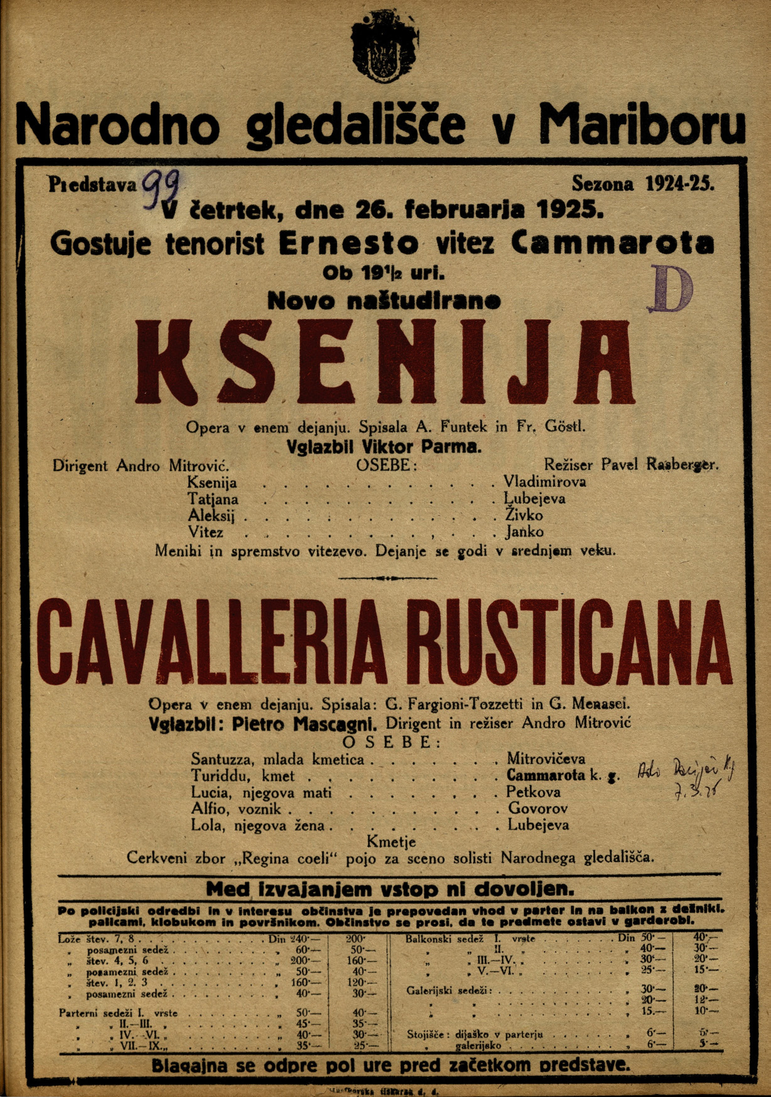 Plakat za predstavi Ksenija in Cavalleria Rusticana v Narodnem gledališču v Mariboru.